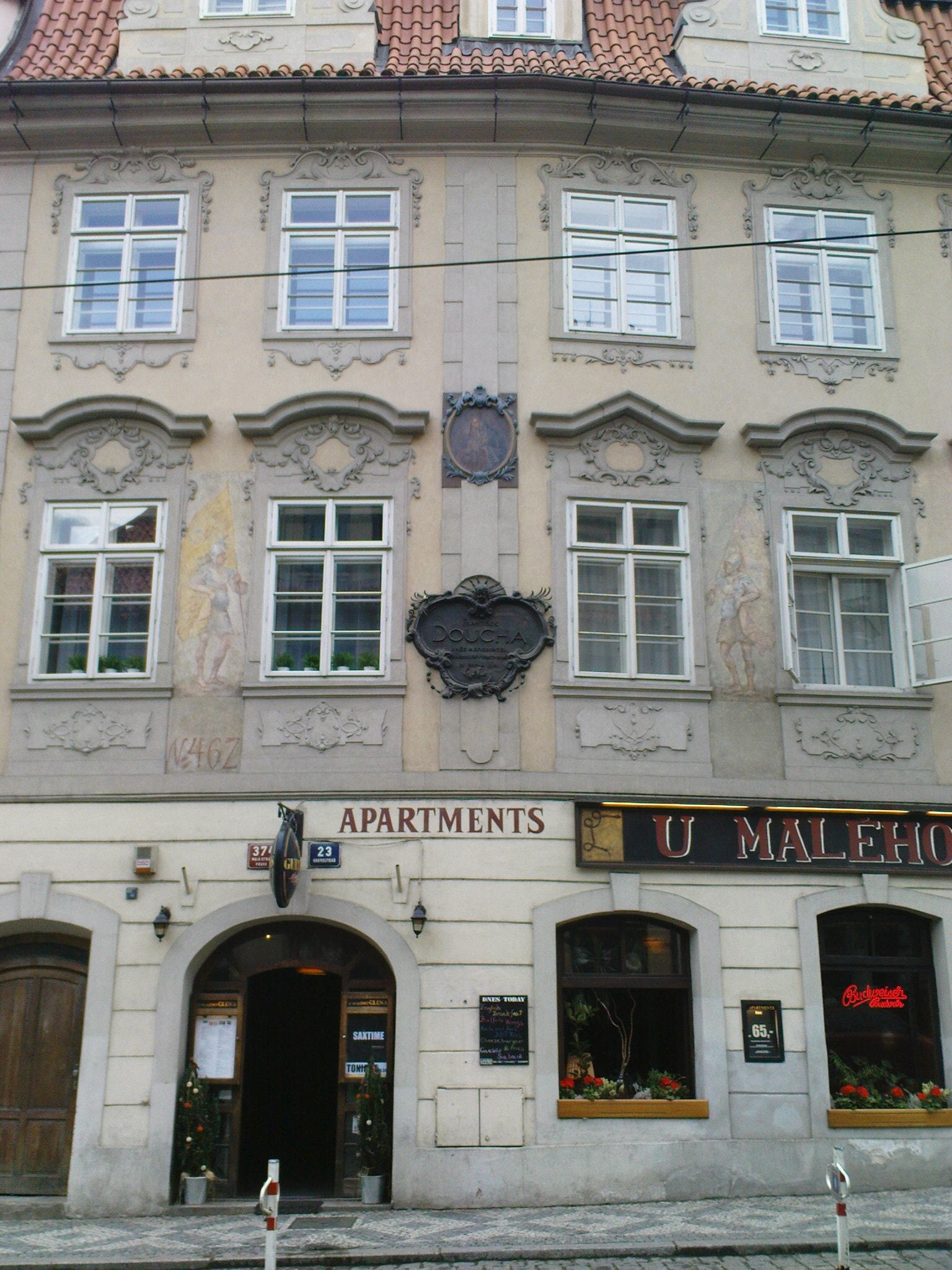 Rodný dům pátera Františka Douchy, Karmelitská ulice, Praha